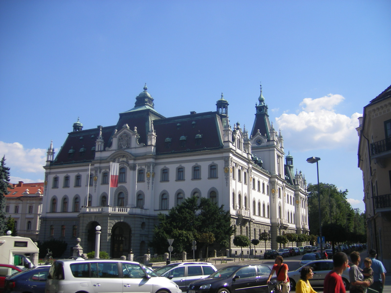 Ljubljana